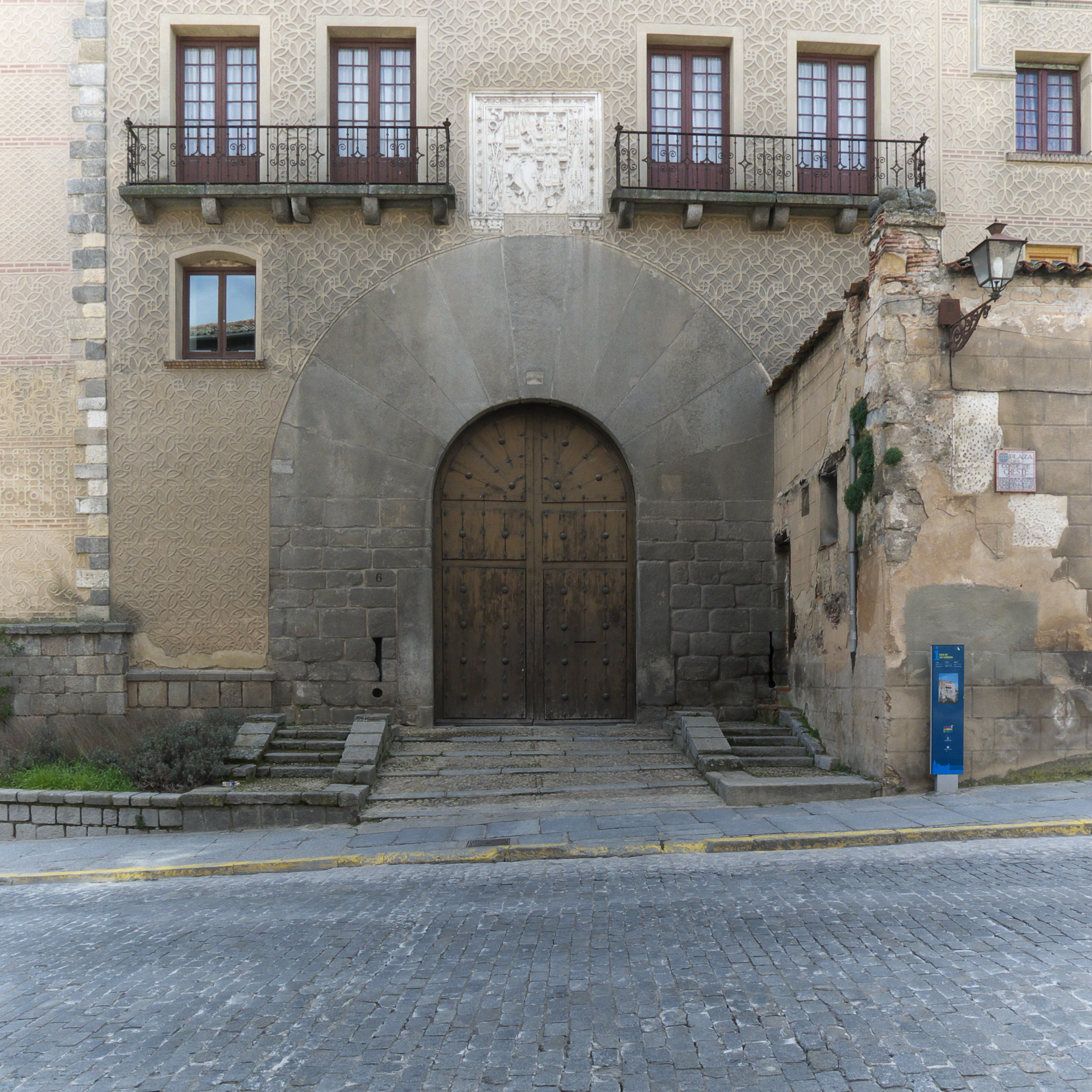 Recibe otras denominaciones, "Casa de Segovia", "Casa de Cabrera Bobadilla", "de los Villares". En el año 1480 pertenece a Andrés Cabrera y Beatriz Bobadilla, Marqueses de Moya. En el año 1520 a los Condes de Chinchón, de la misma Casa.